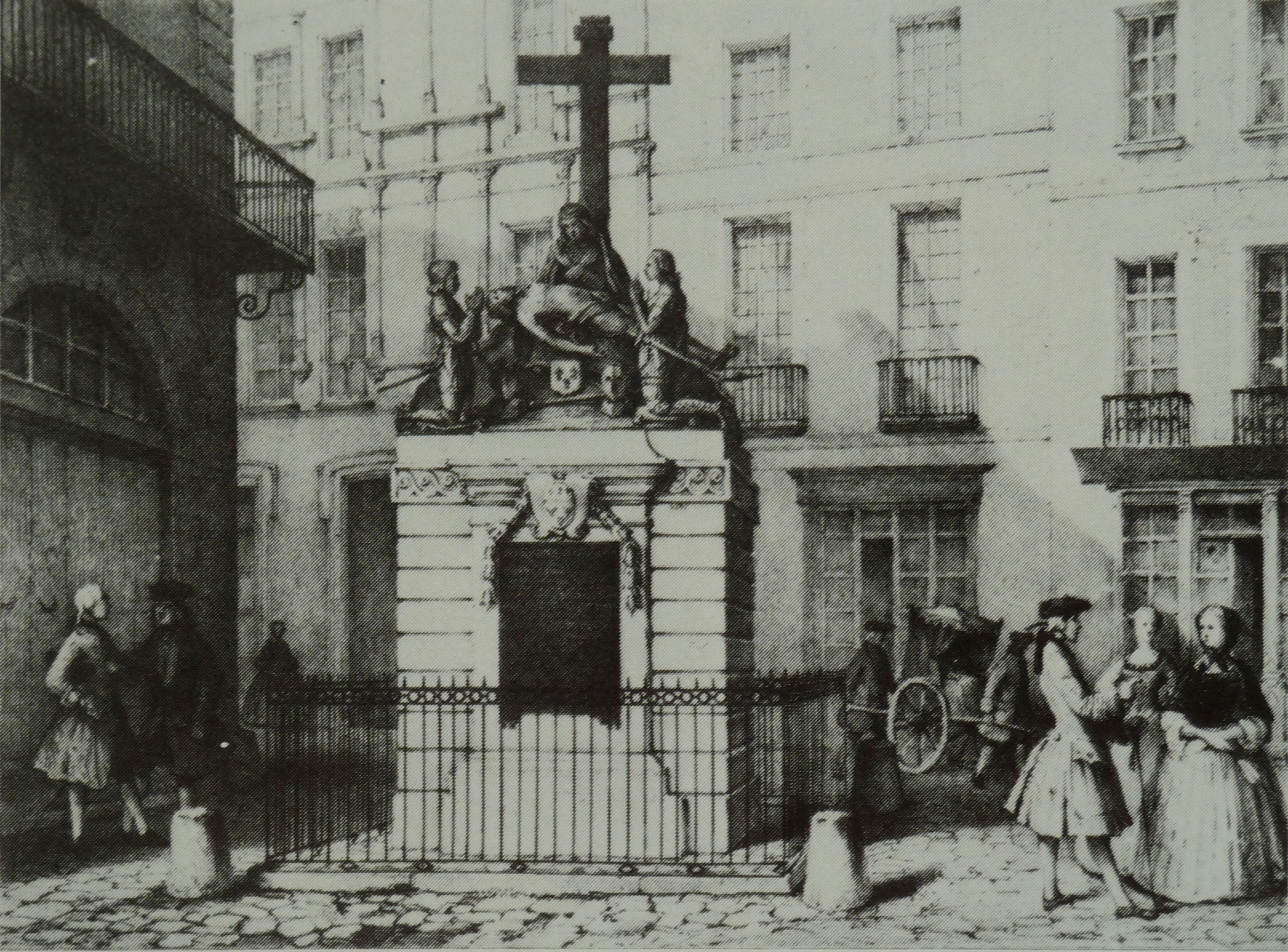 Monument à Jeanne d'Arc à Orléans, deuxième état, après sa réinstallation en ville en 1771. Lithographie de Pensée.